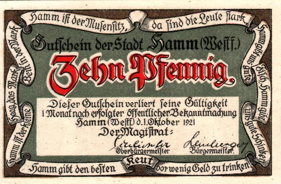 Das Foto zeigt die Rückseite von Notgeld aus dem Jahr 1921, Motiv: Hammer Keut.